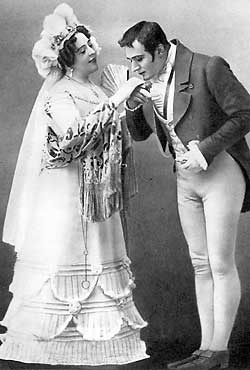 «Горе от ума» А. Грибоедова. В роли Натальи Дмитриевны — А. Яблочкина, в роли Чацкого — М. Ленин. 1909–1910.